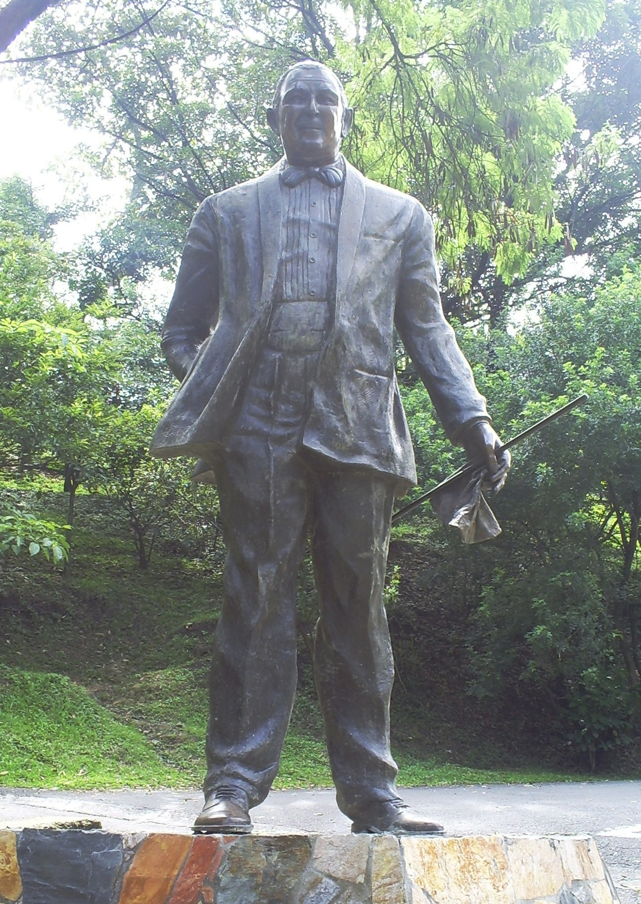 Estatua de Guillermo Zuluaga "Montecristo" (estatua). Artista: Luz María Piedrahita. Ubicada en el Cerro Nutibara. Medellín, Colombia